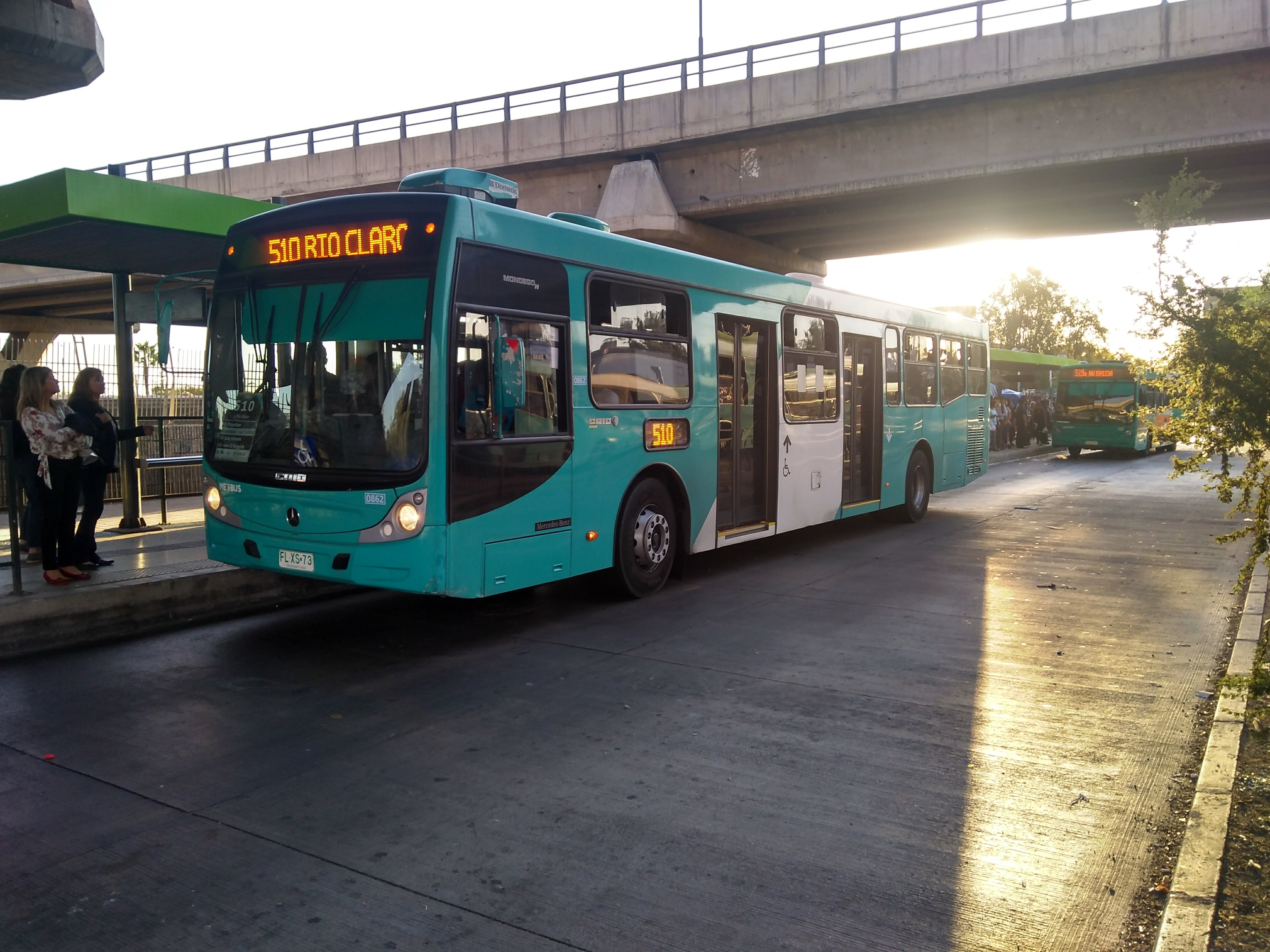 Bus del recorrido 510 en su color anterior tomando pasajeros en metro Grecia